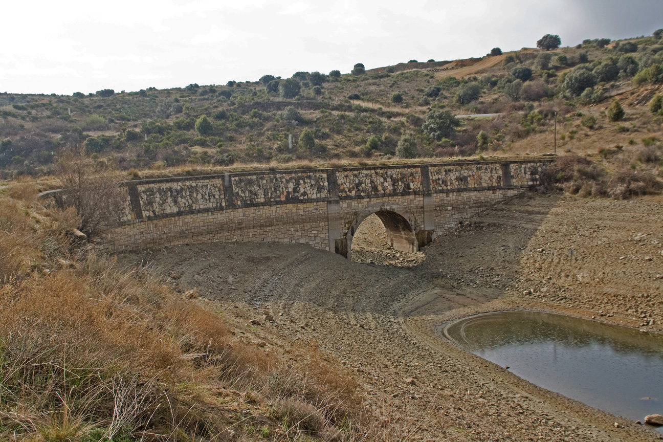 Acueducto en la variante del Canal Alto construida en 1967 para salvar el embalse hoy llamado de Pedrezuela